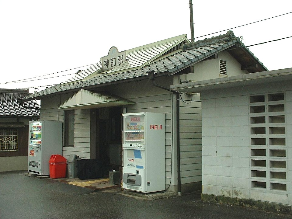 高徳線神前駅